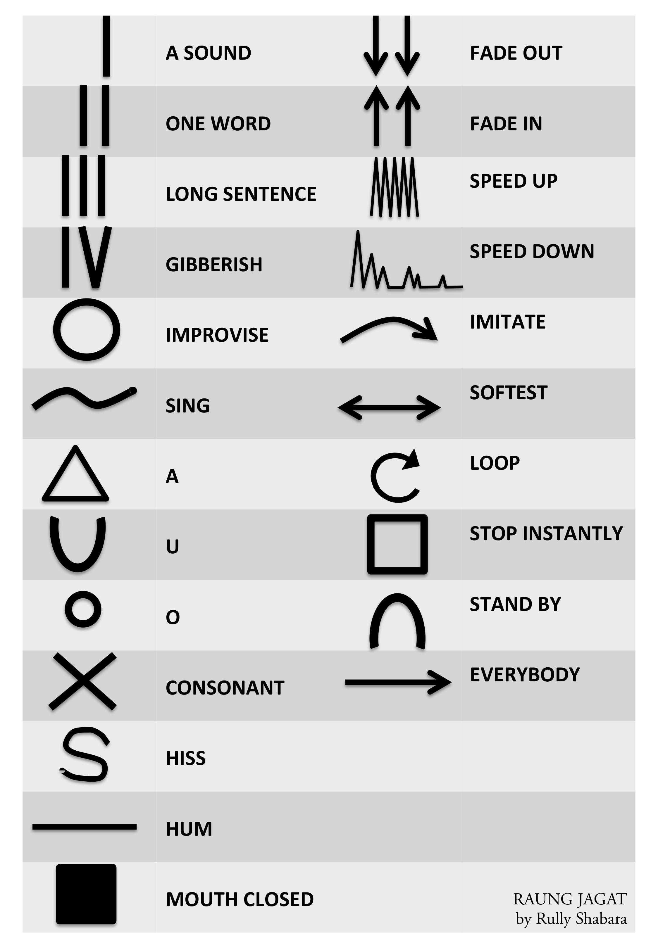 Bagian pertama dari kode (simbol) perintah (conduct) di dalam paduan suara Raung Jagat.